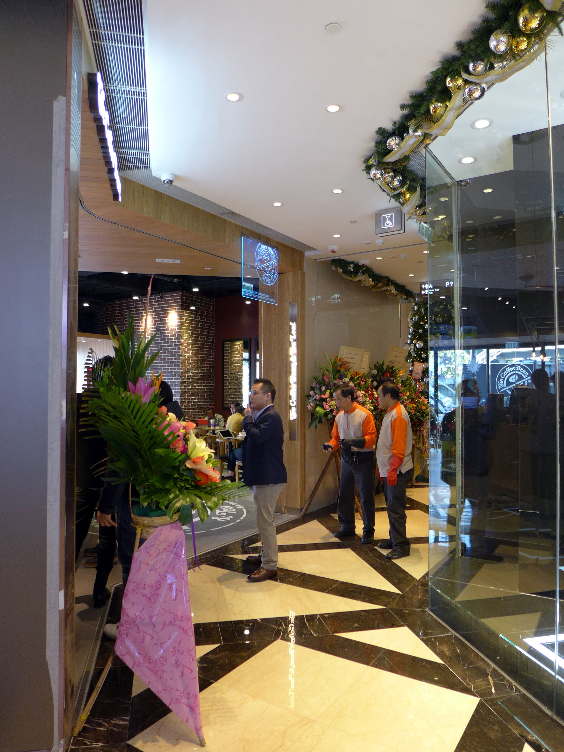 Sino Plaza GF Access 201312